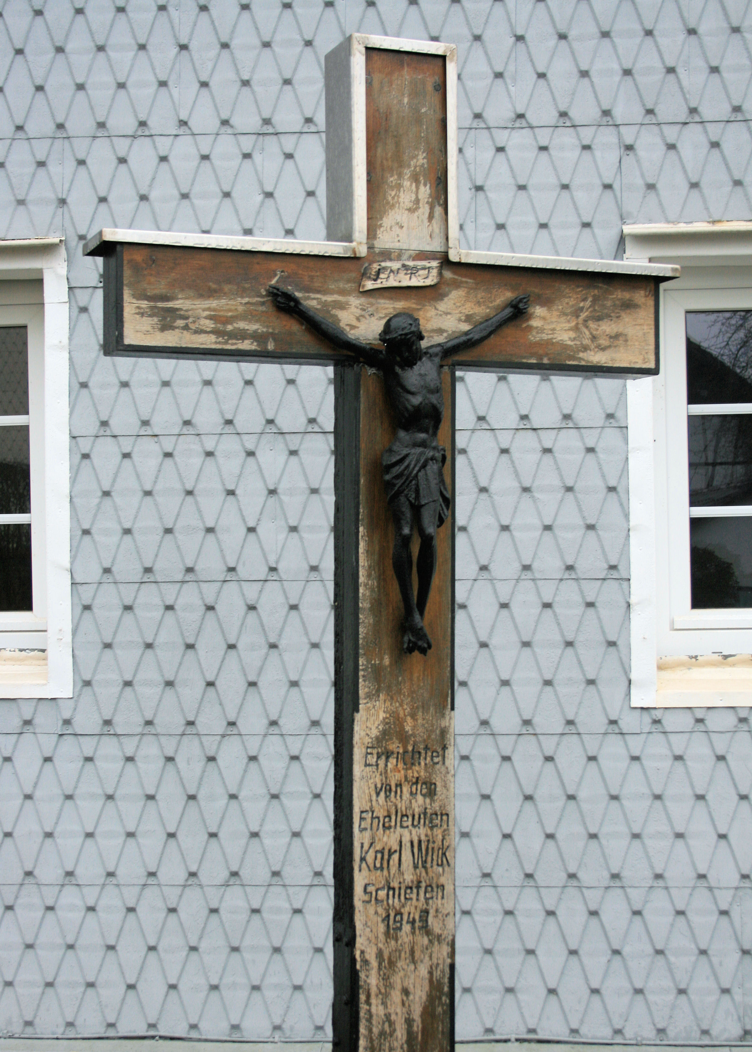 Wegkreuz Eitorf, Schiefener Straße